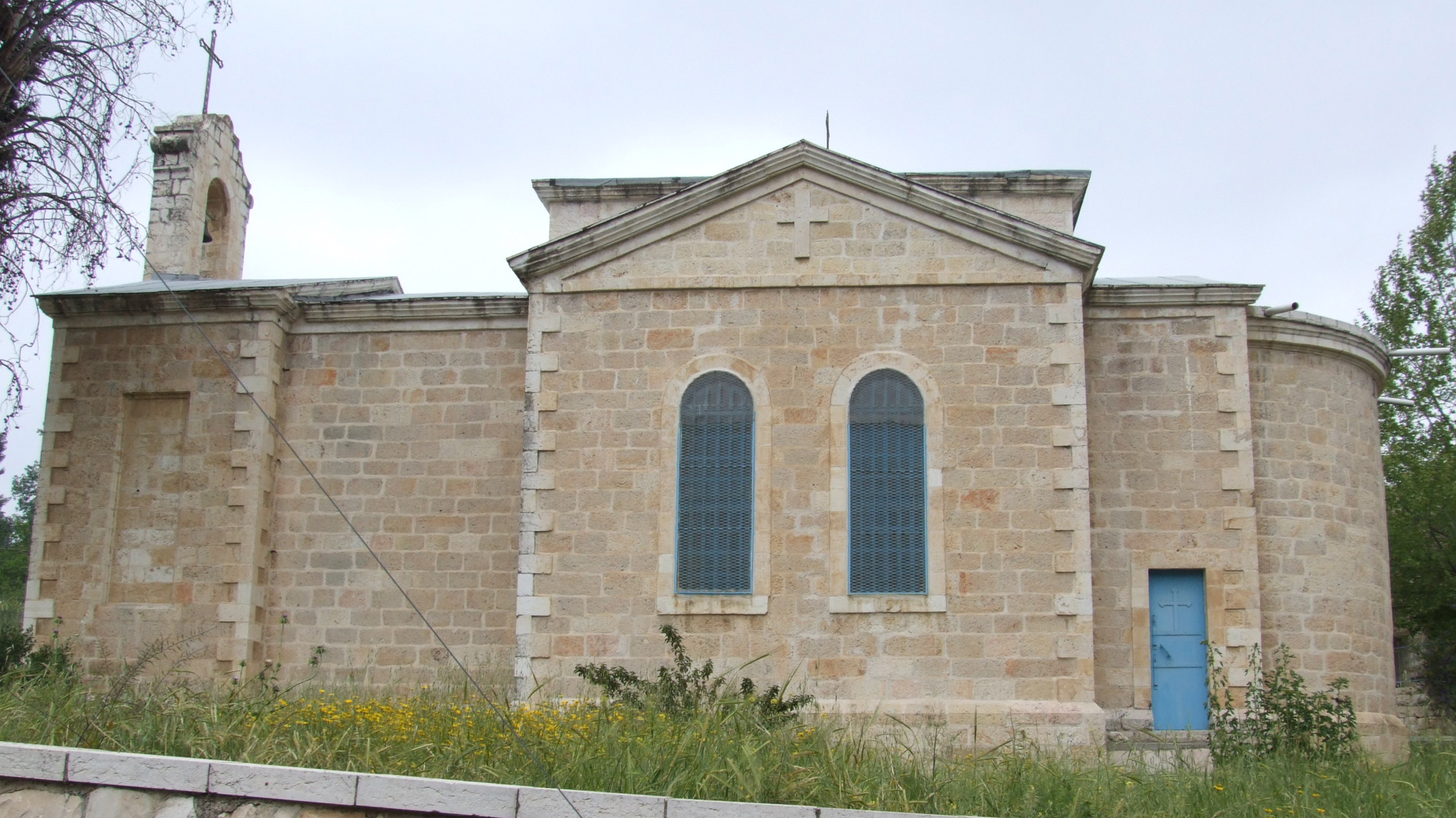 Ein Kerem, Jerusalem, Israel, Saint John's Greek Orthodox Church in HaOren street.